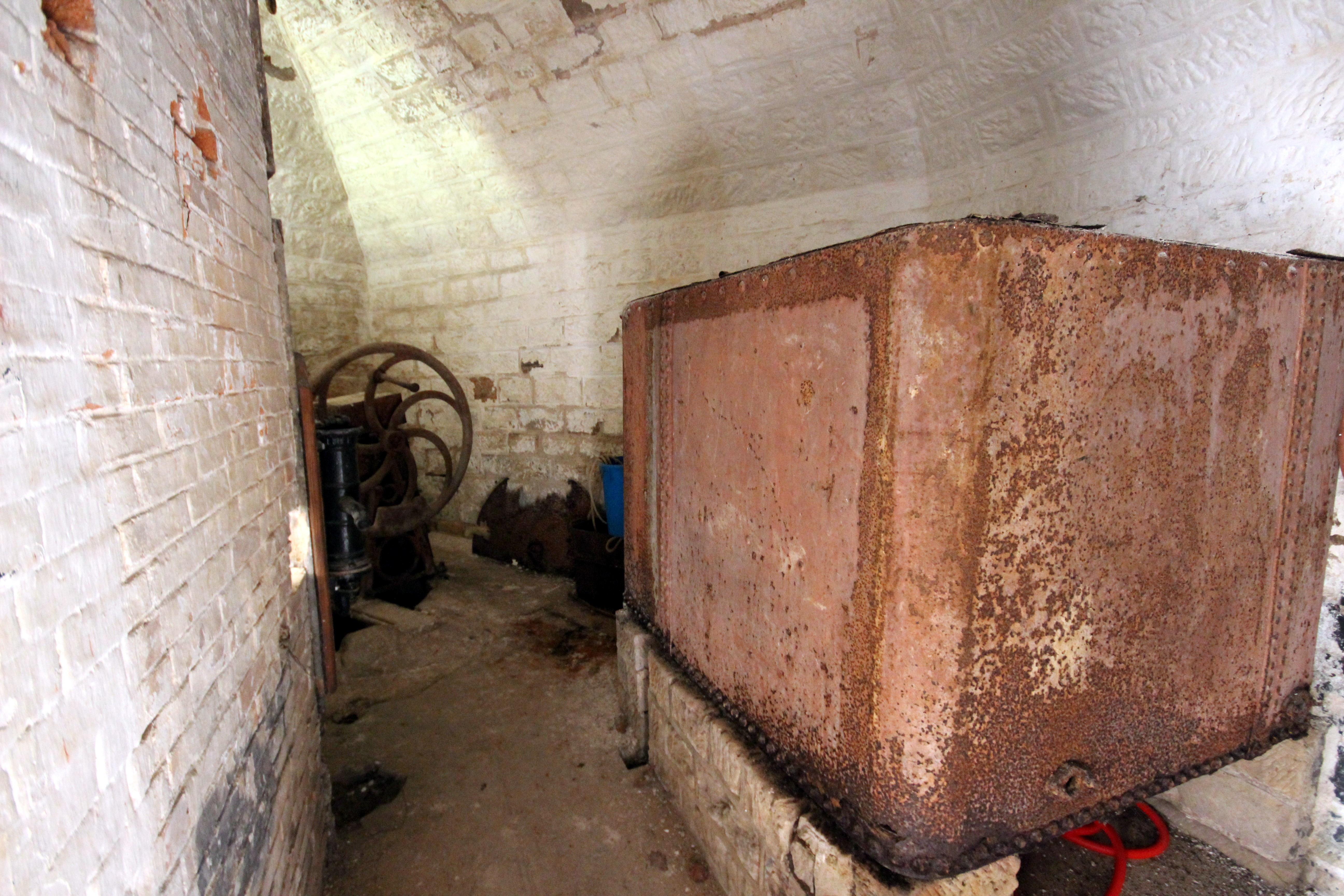 Le puits et la citerne de consommation journalière du fort de Bois l'Abbé